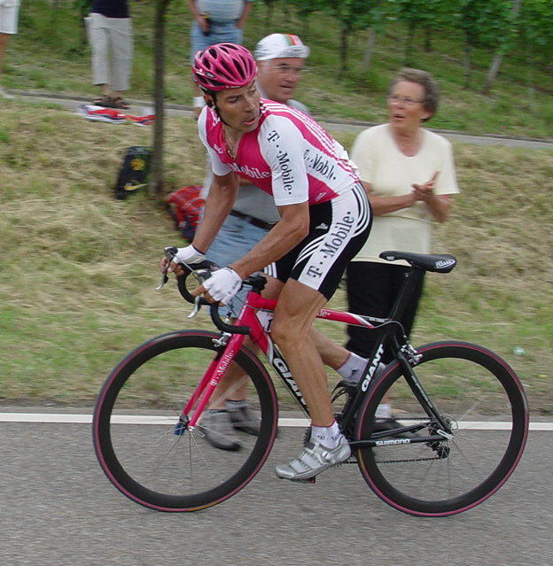 Erik Zabel bei der Deutschland Meisterschaft 2004 in Freiburg